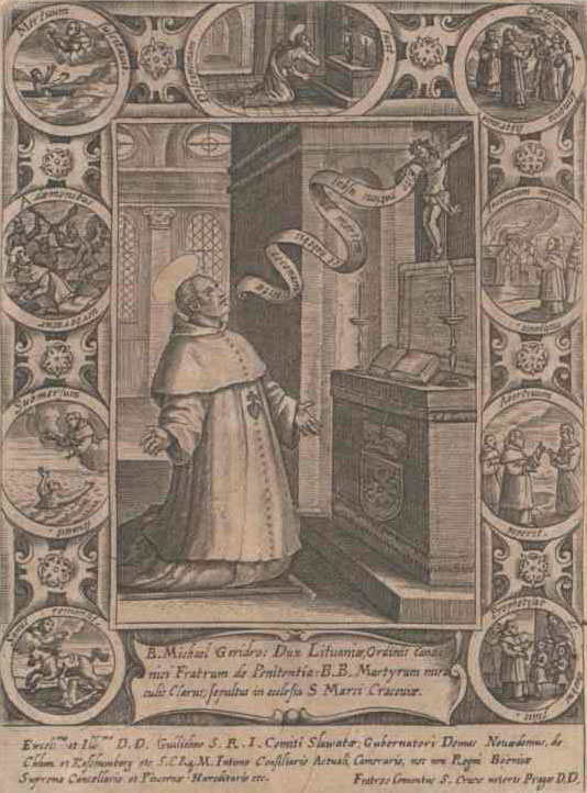 Беларуская (тарашкевіца): Партрэт Міхала Гедройца (Michał Giedrojc)